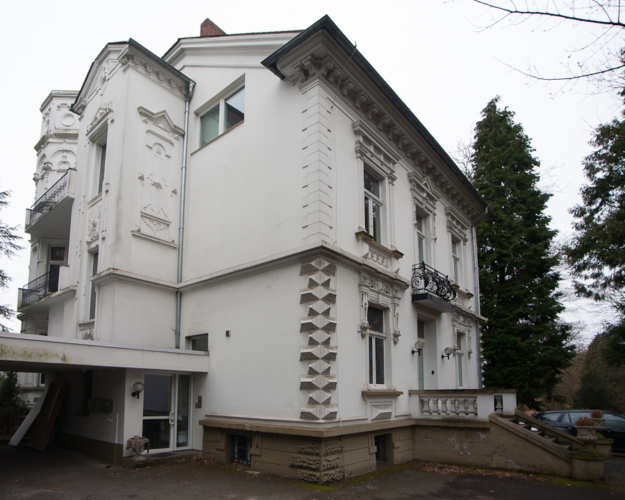 Denkmalgeschützte Villa, Am Lessing 6, Königswinter This is a photograph of an architectural monument. 348